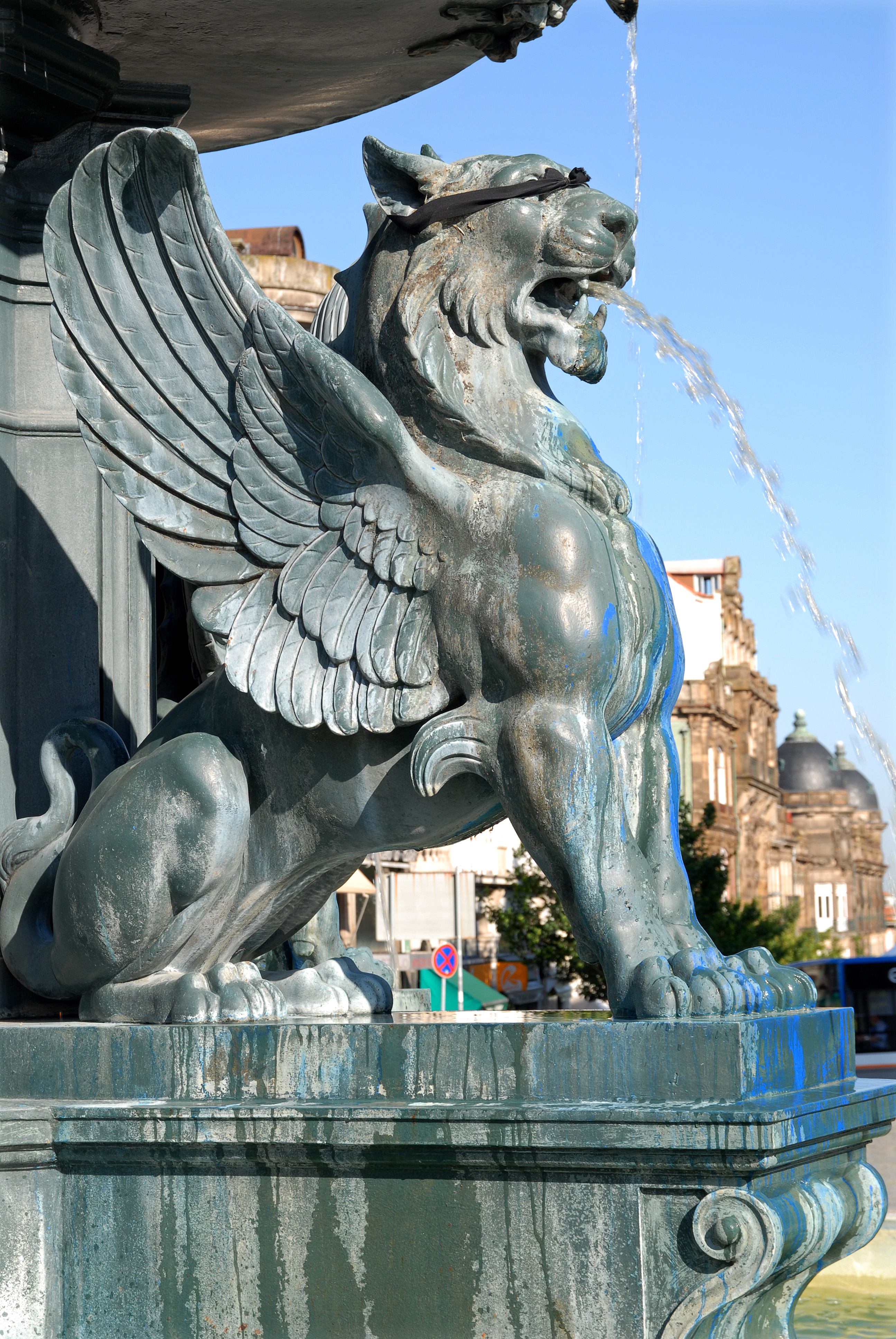 Fonte dos Leões This file was uploaded for Wiki Loves Monuments in Portugal with the unique identifier 97003969.